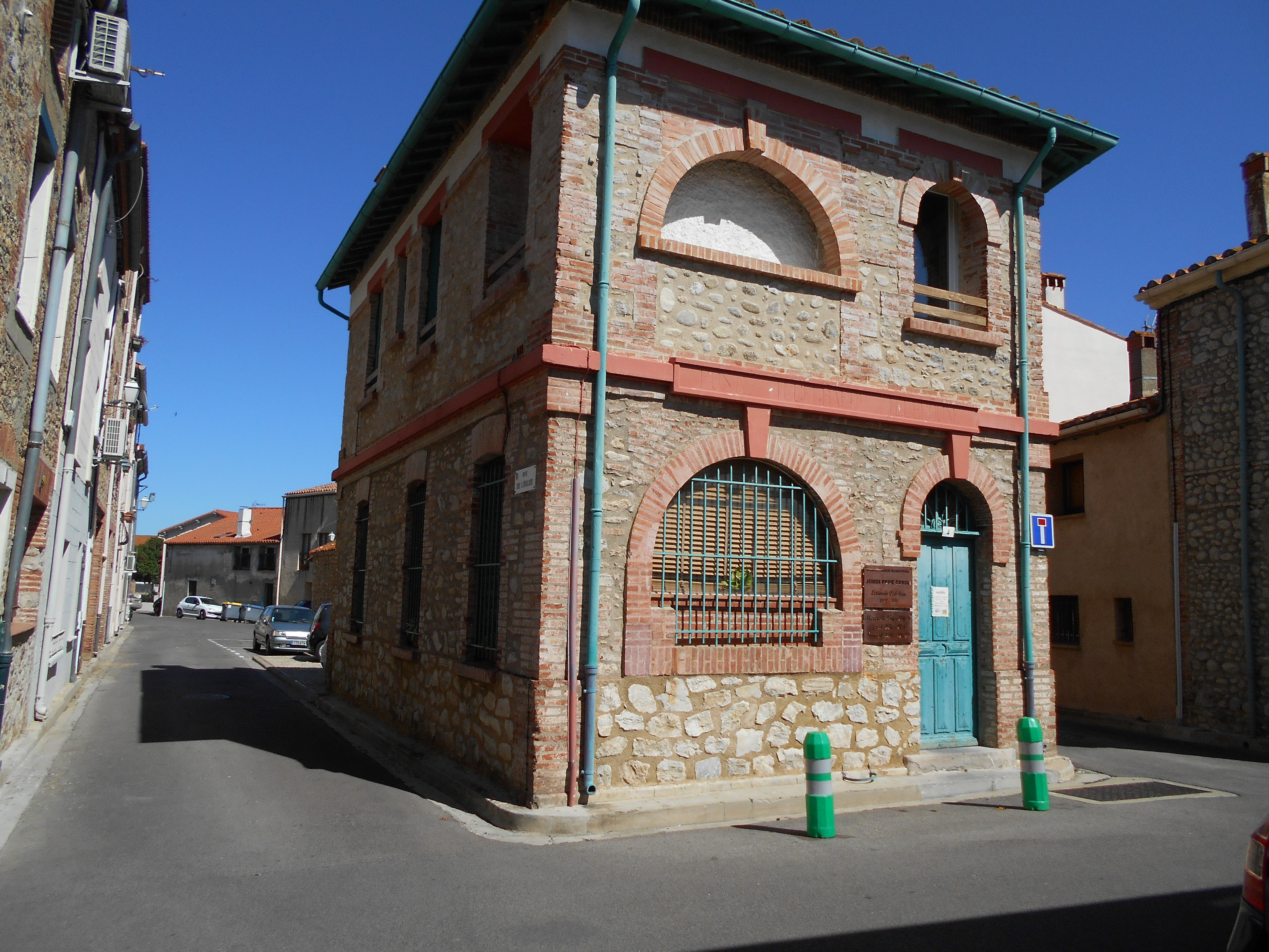 Les antigues escoles